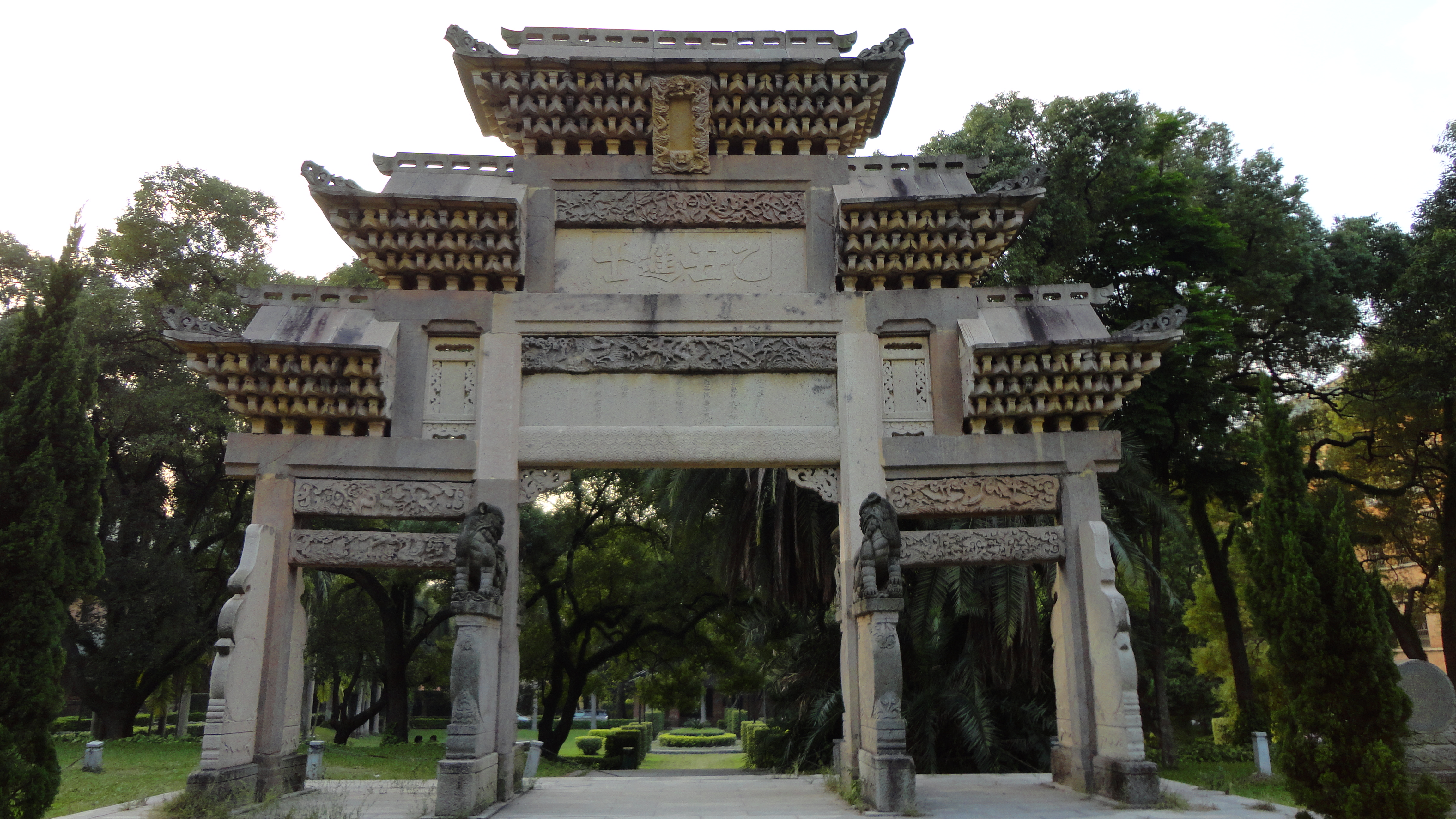 嶺南大學時期的乙丑進士坊，於1999年重建。